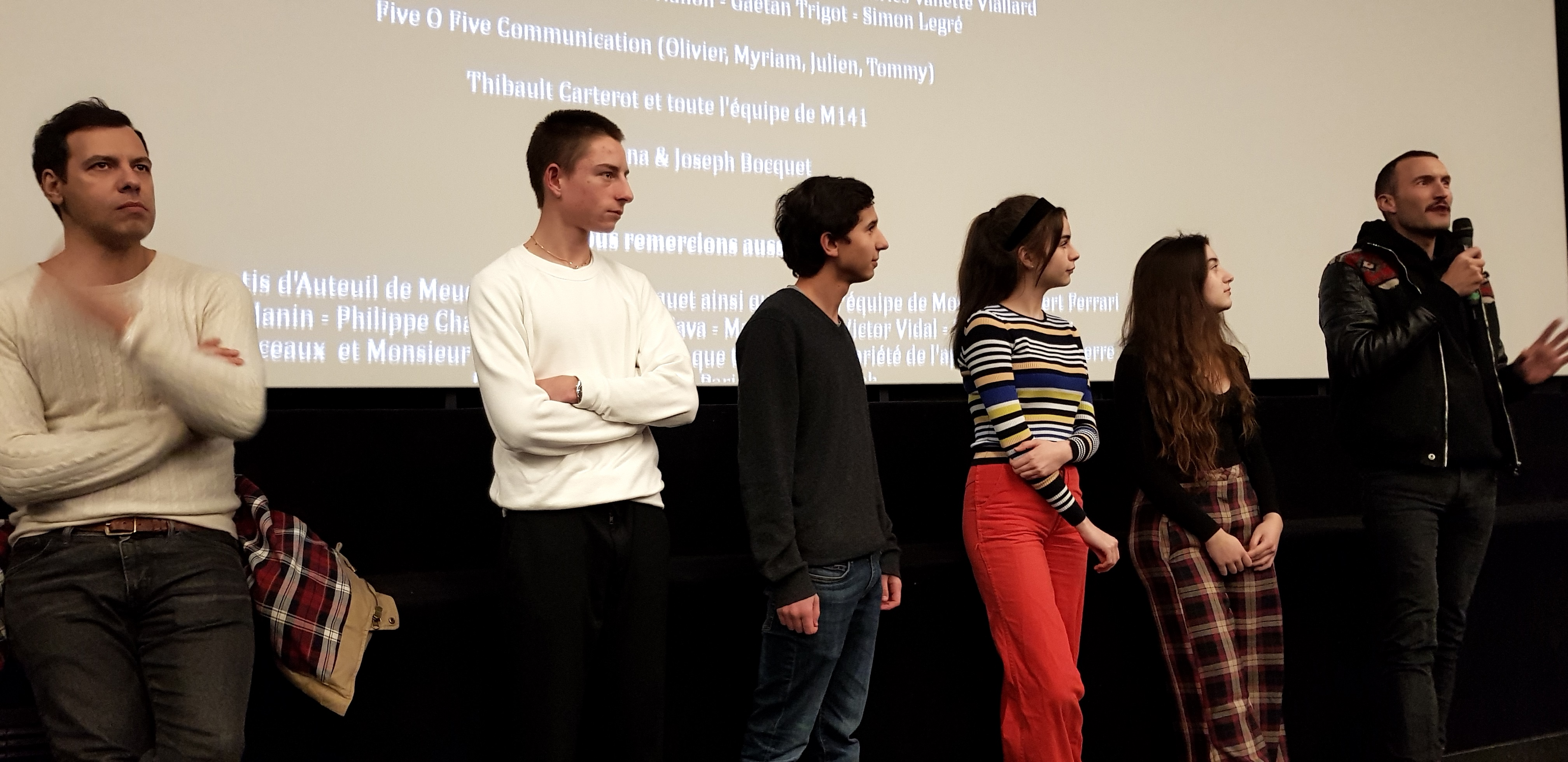 Équipe du film lors de l'avant-première du film "L'Heure de la sortie" à Paris. De gauche à droite : Laurent Lafitte, Victor Bonnel, Thomas Guy, Adèle Castillon, Luàna Bajrami et Sébastien Marnier